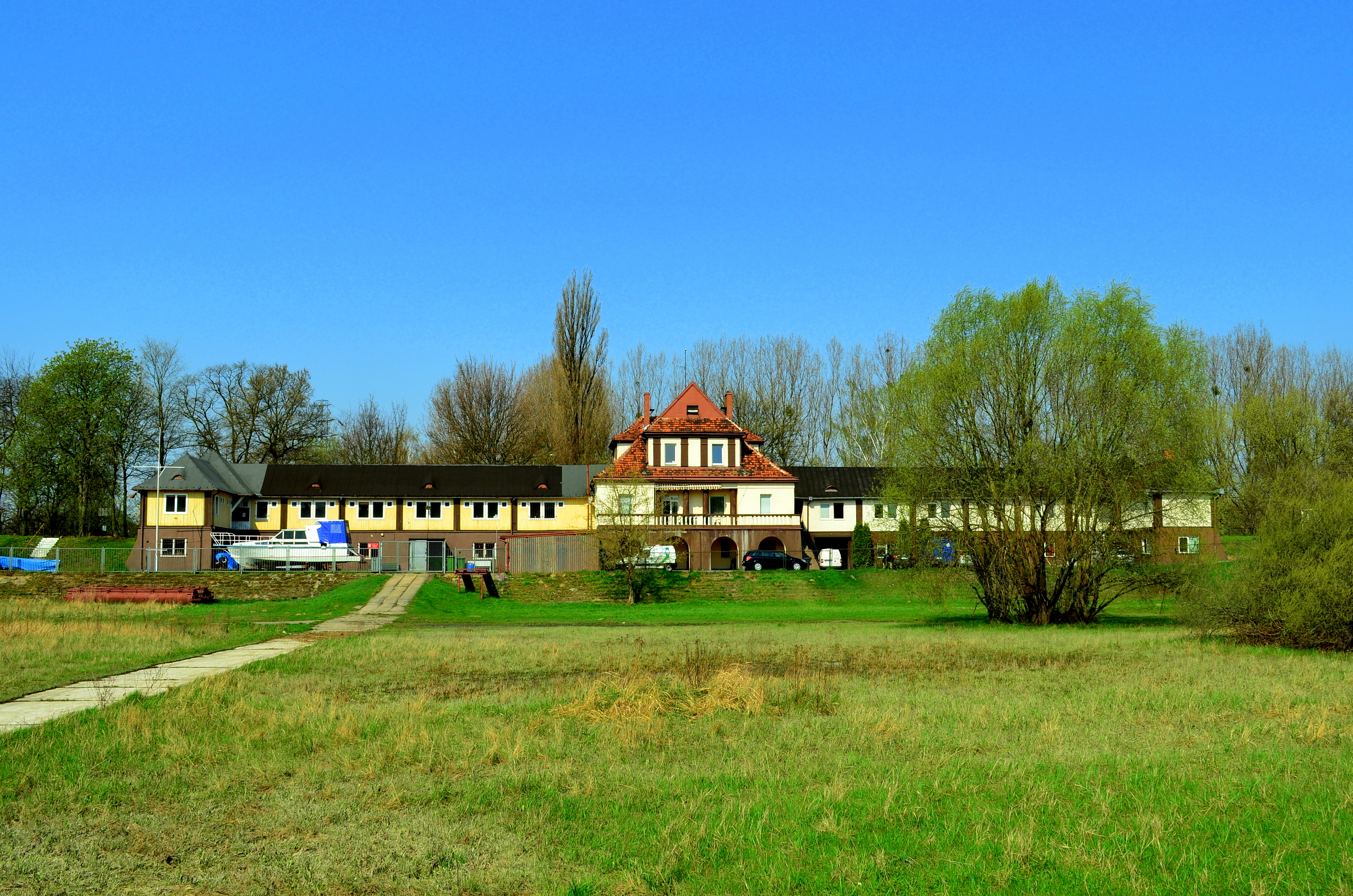 Poznań, budynek Miejskich Łazienek Rzecznych, 1924-1925